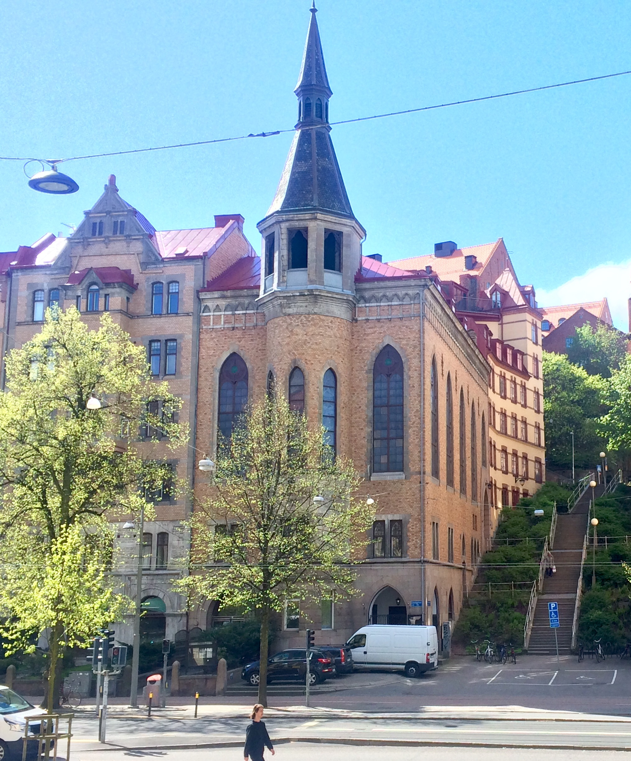 Linneakyrkan vid Linnégatan 35 och Övre Djupedalsgatans trappor upp till Nordhemsgatan.